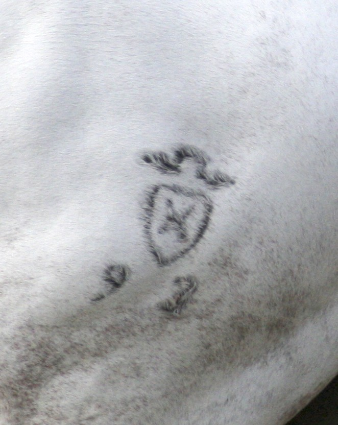 Brandzeichen des Holsteiners